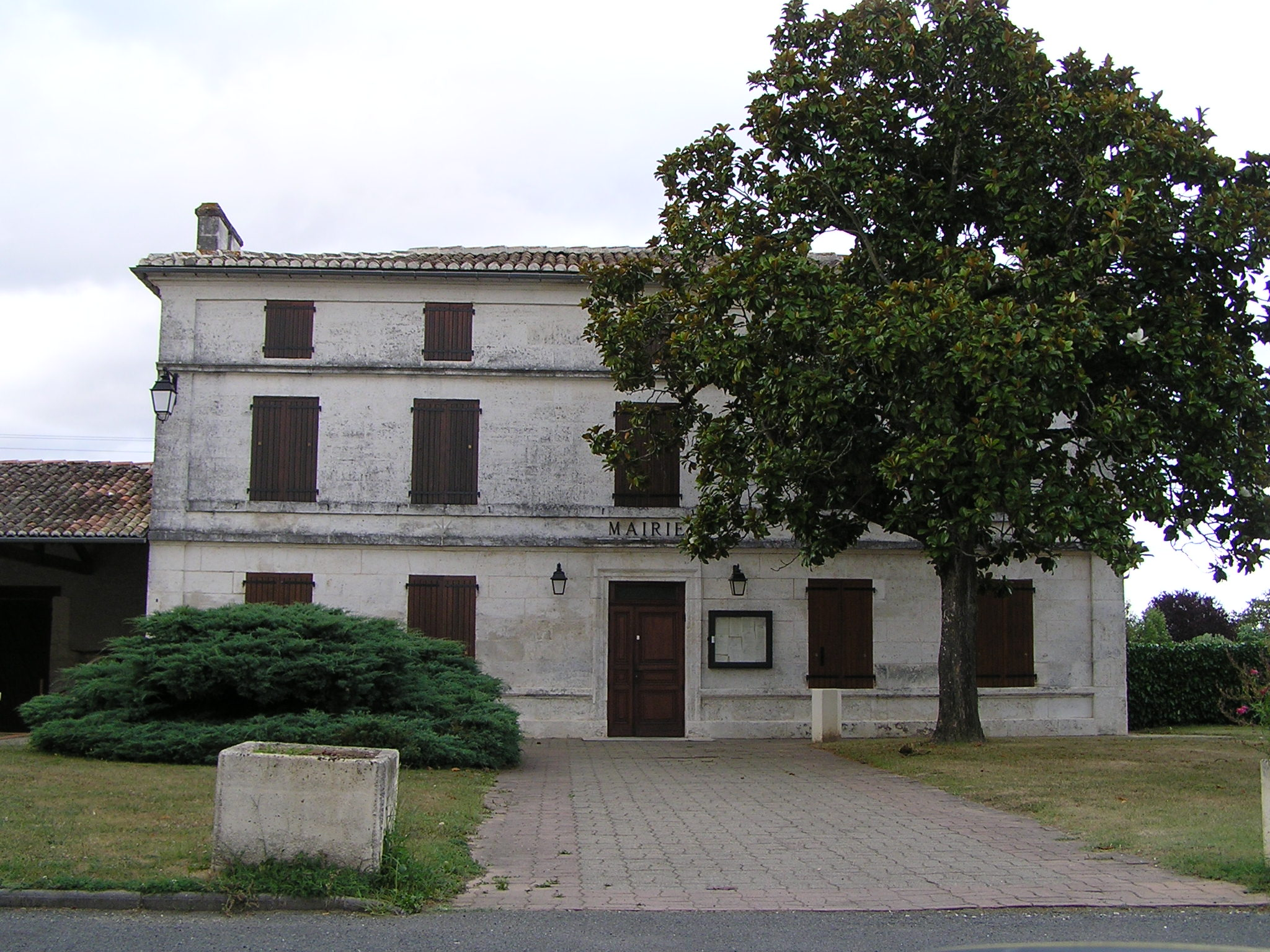 mairie de Balzac